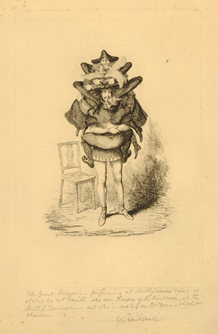 Портрет Джованни Баттиста Бельцони